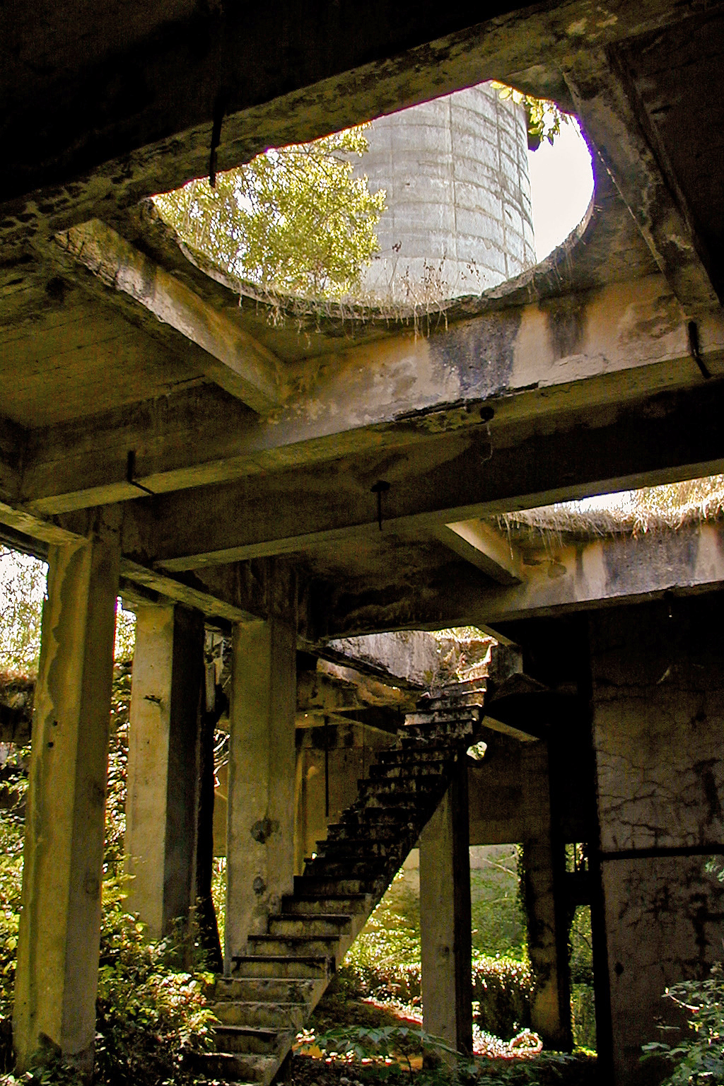 Les ruines de l'usine de la mine des Télots.